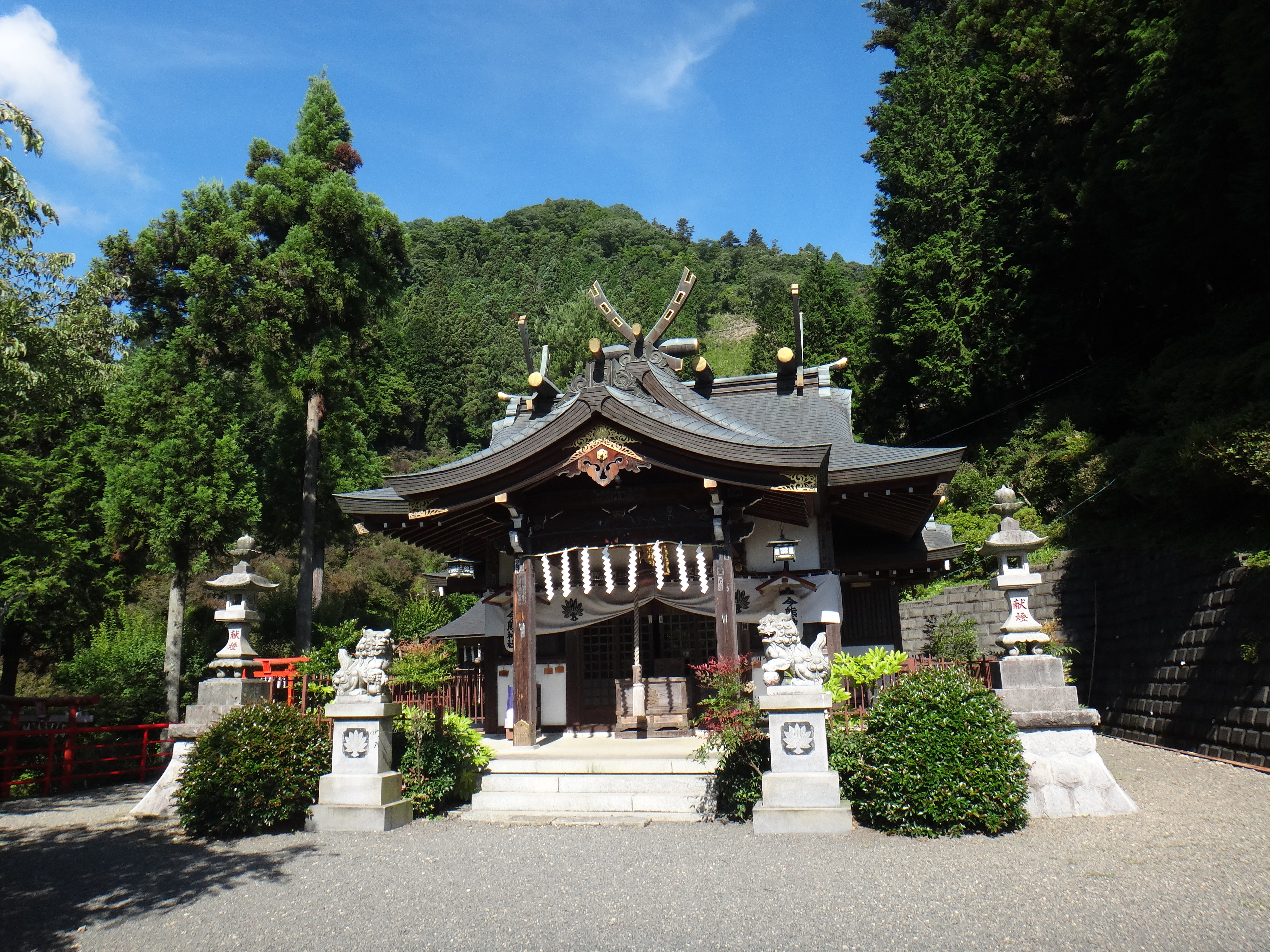 今熊神社から今熊山を見上げる